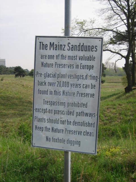 Brunnen an der Ortsverwaltung Mombach